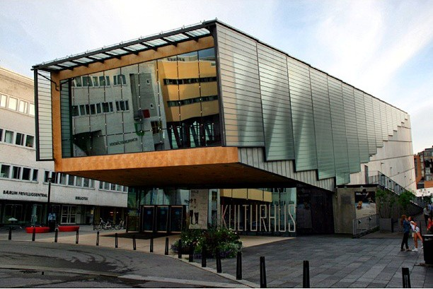 Bærum kulturhus, Sandvika